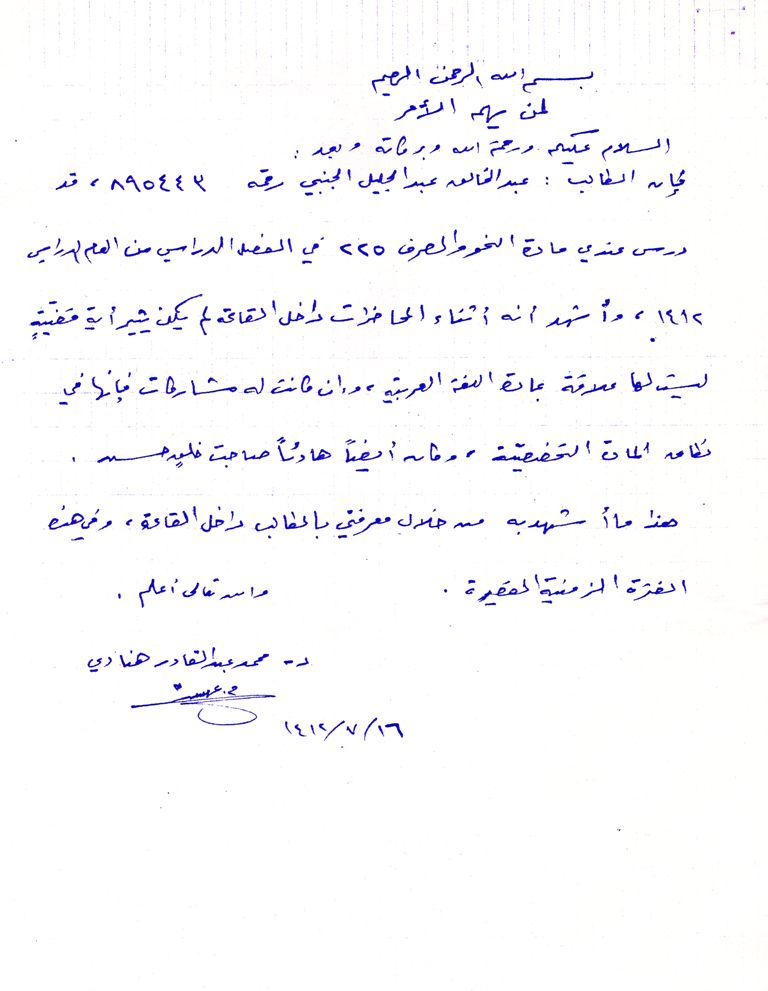 شهادة من الدكتور محمد عبد القادر هنادي عضو هيئة التدريس بجامعة الملك عبد العزيز بجدة لتلميذه عبد الخالق الجنبي.